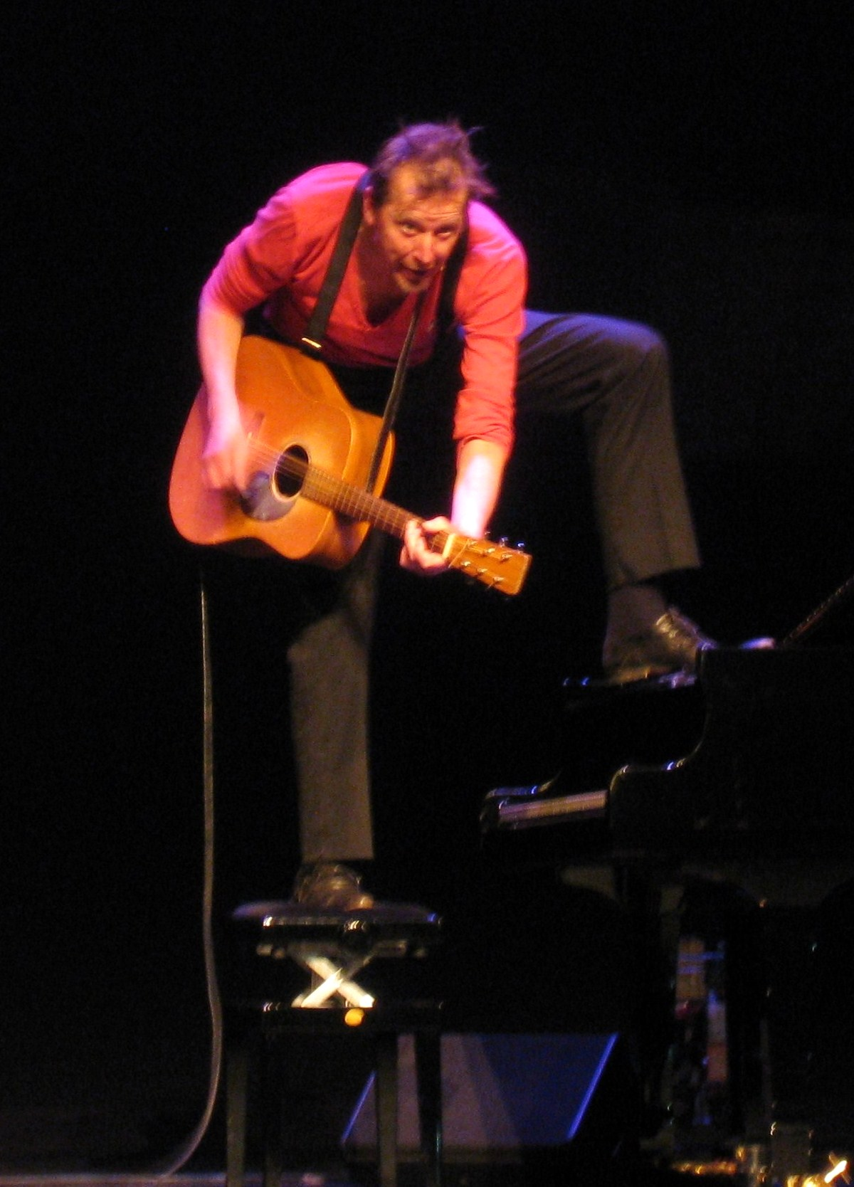 Jan Rot tijdens zijn theatershow Nummerrr 1!!! in De Kleine Komedie in Amsterdam op 12 januari 2014